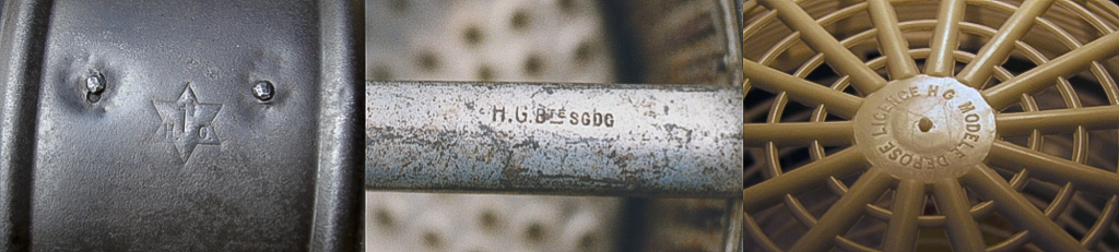 Trois formes d'estampage sur la ceinture centrale des réchauds transparents à alcool H.G